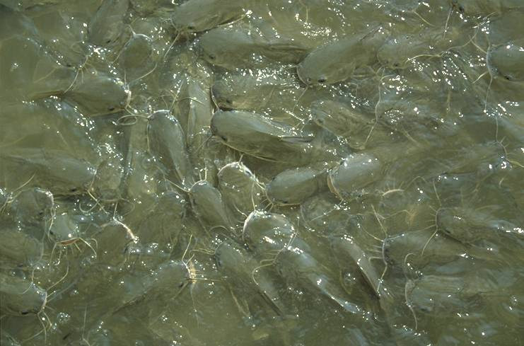 Wels-Gedränge (neben einem Fluss-Restaurant), Mexiko